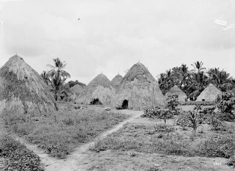 Dorf Korogwe in Usambara